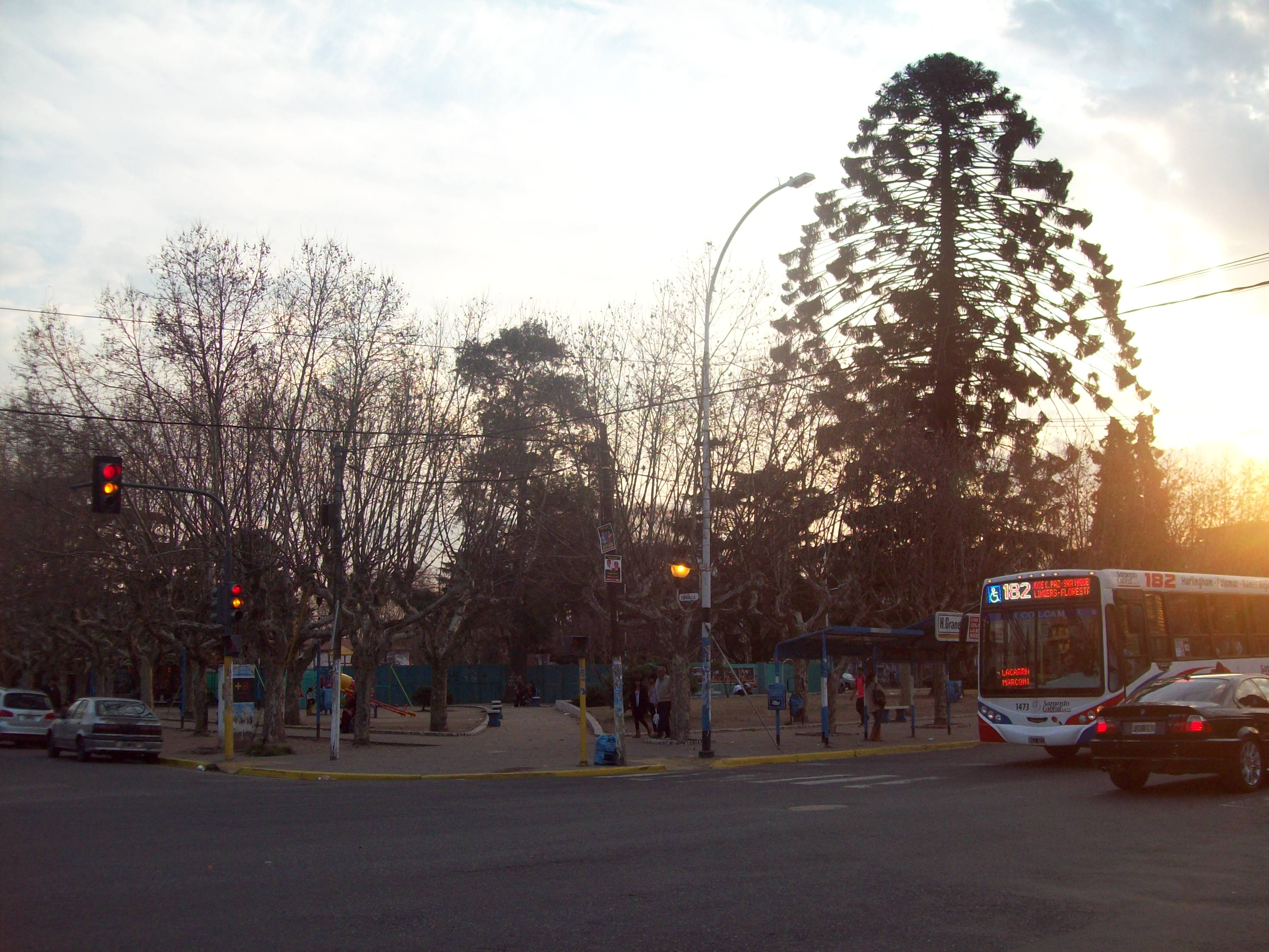 Plaza Muñiz de la localidad de Muñiz